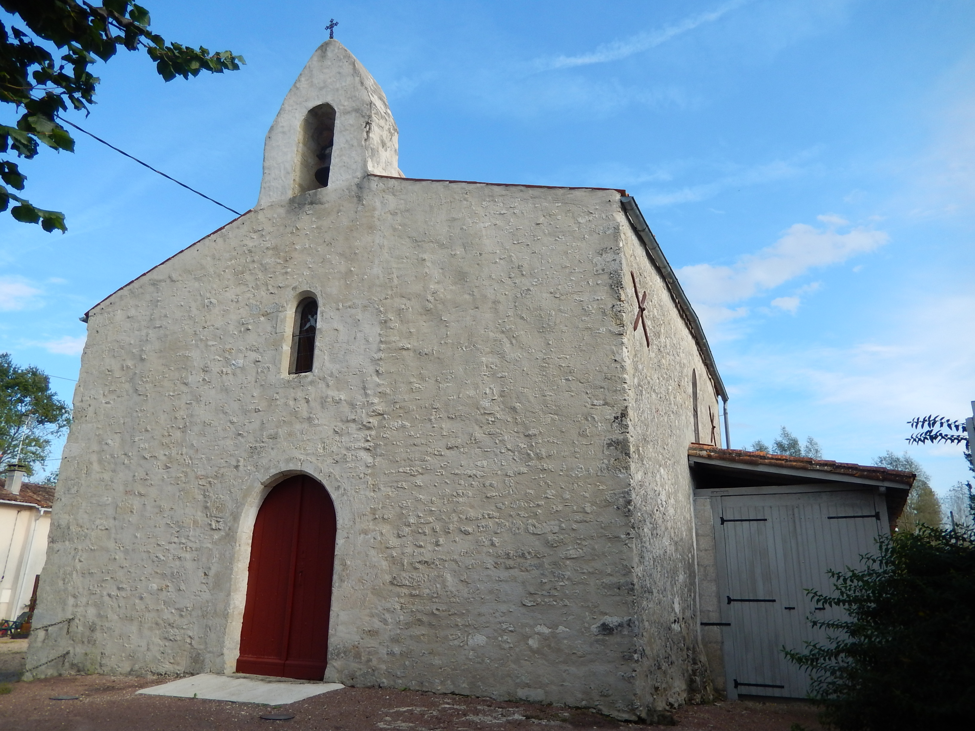 L'église de Saint-Pardoult, en Charente-Maritime.